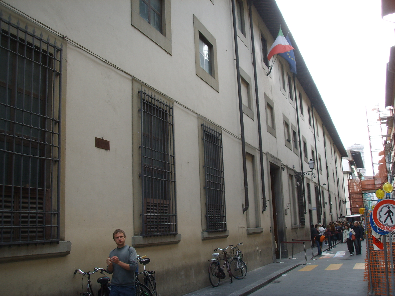 Galleria dell'accademia, firenze